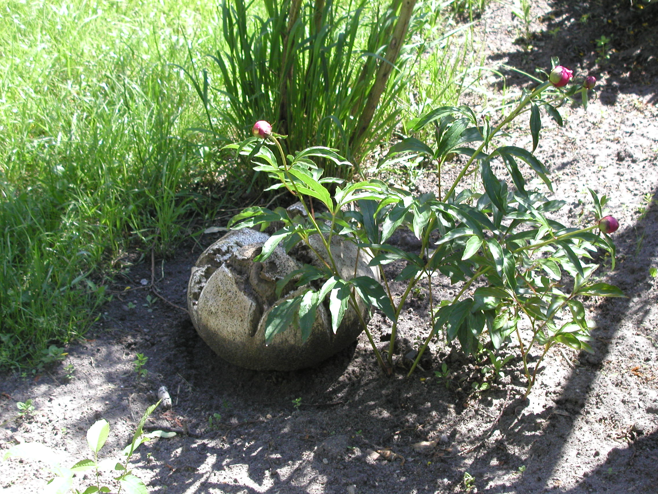 Langermannia gigantea pl: purchawica olbrzymia dojrzały owocnik, opiaszczony z powodu deszczu. (Oborniki Śląskie)